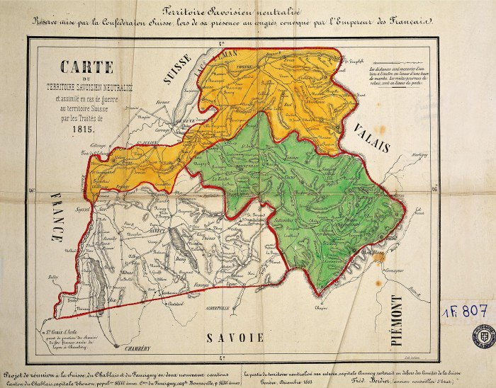 Carte du territoire savoisien neutralisé. Projet de réunion à la Suisse du Chablais et du Faucigny en deux nouveaux cantons, 1863.